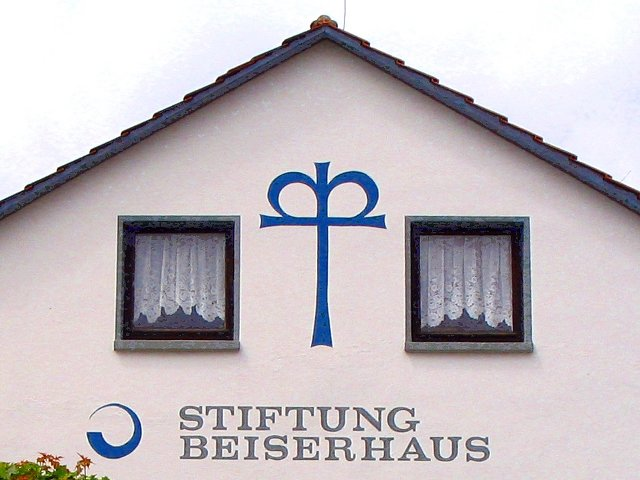 Logo der Stiftung Beiserhaus an einer Hauswand